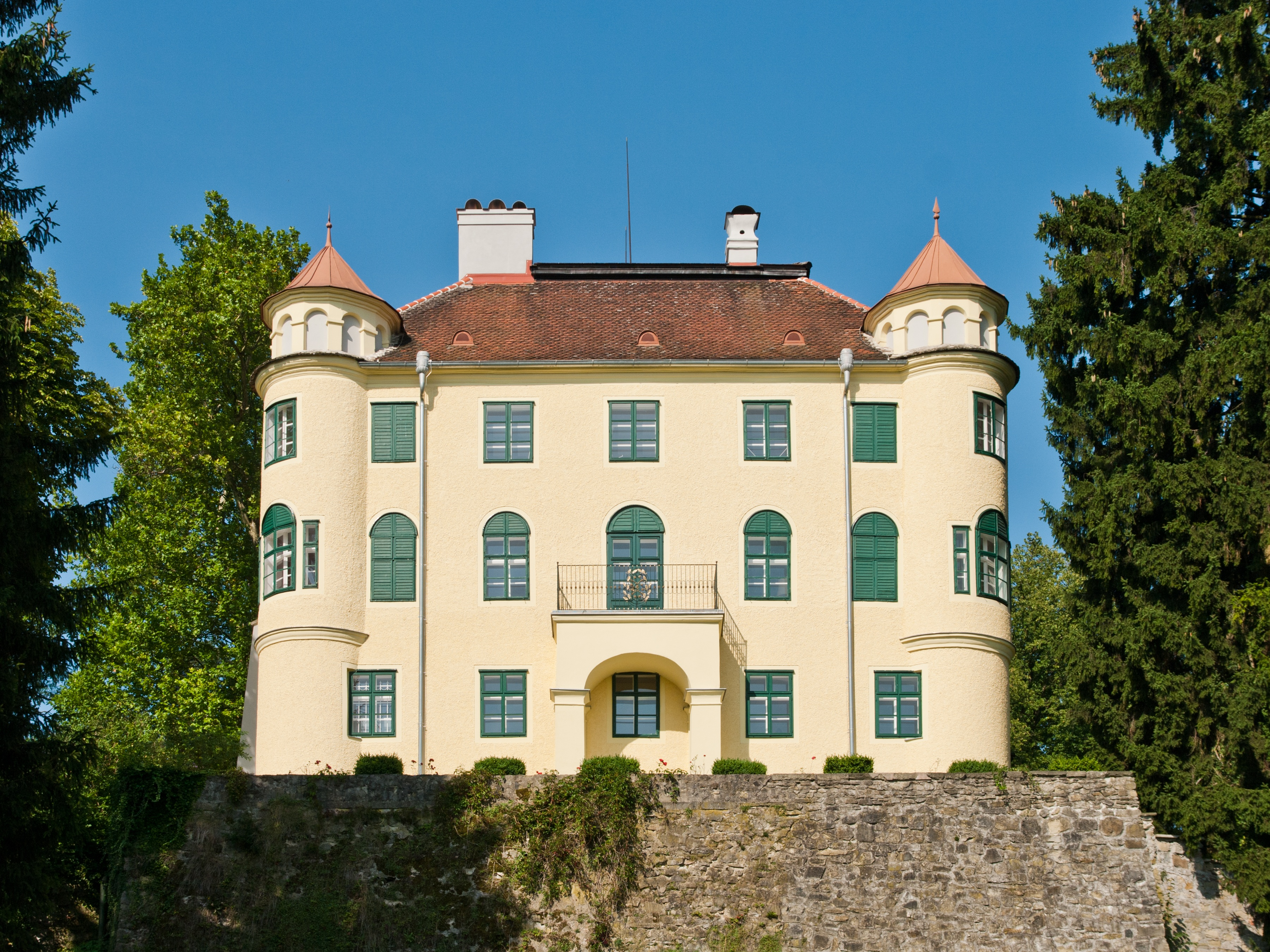 Schloss Grünbichl in Kilb. Stammsitz der Gienger von Grienpichl